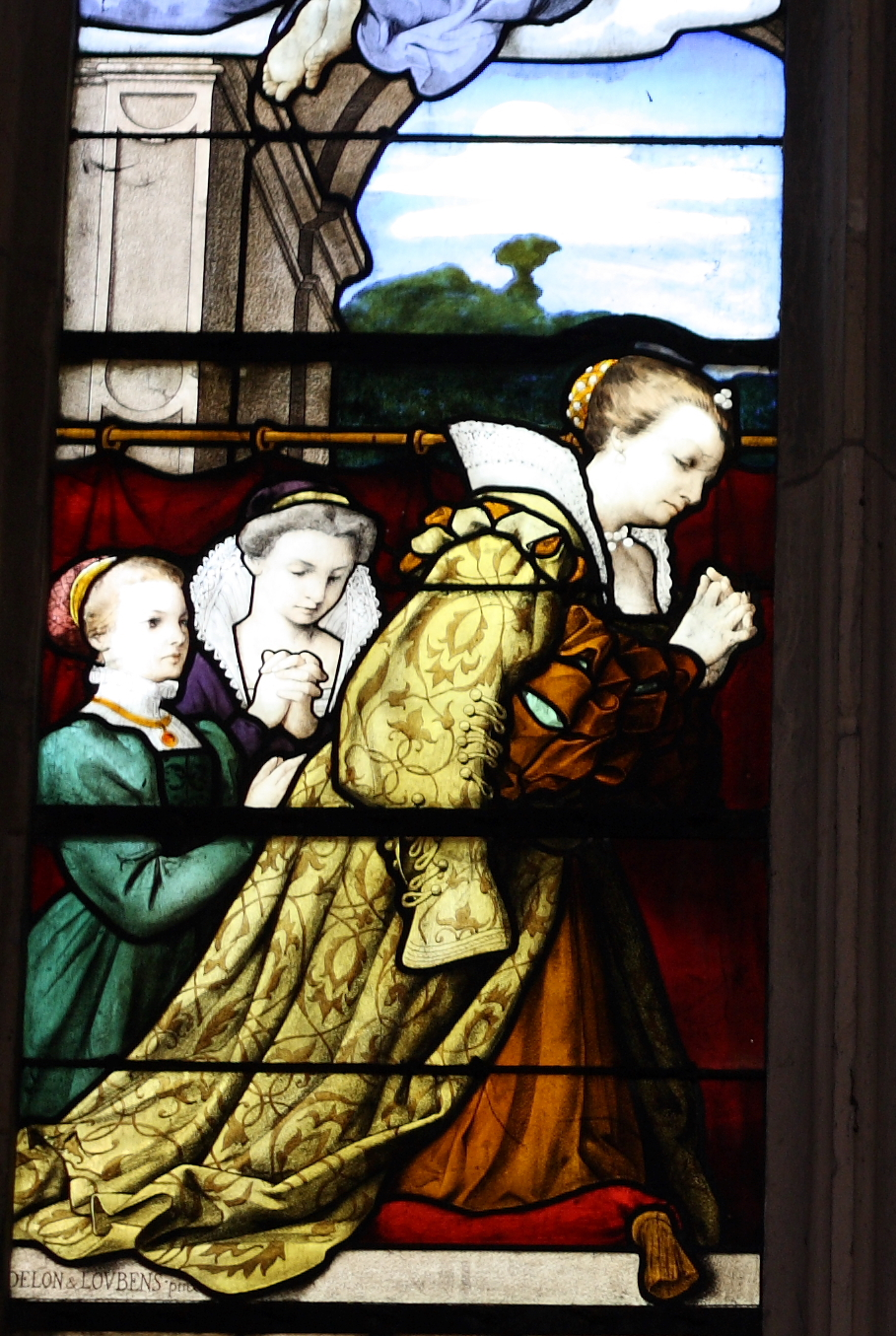 Ausschnitt eines Bleiglasfensters (19. Jahrhundert) in der katholischen Pfarrkirche Saint-Martin (Collégiale Saint-Martin) in Montmorency, Darstellung: Jeanne de Montmorency mit zwei Töchtern, Signatur: "DELON & LOUBENS..." (möglicherweise von dieser Firma restauriert)